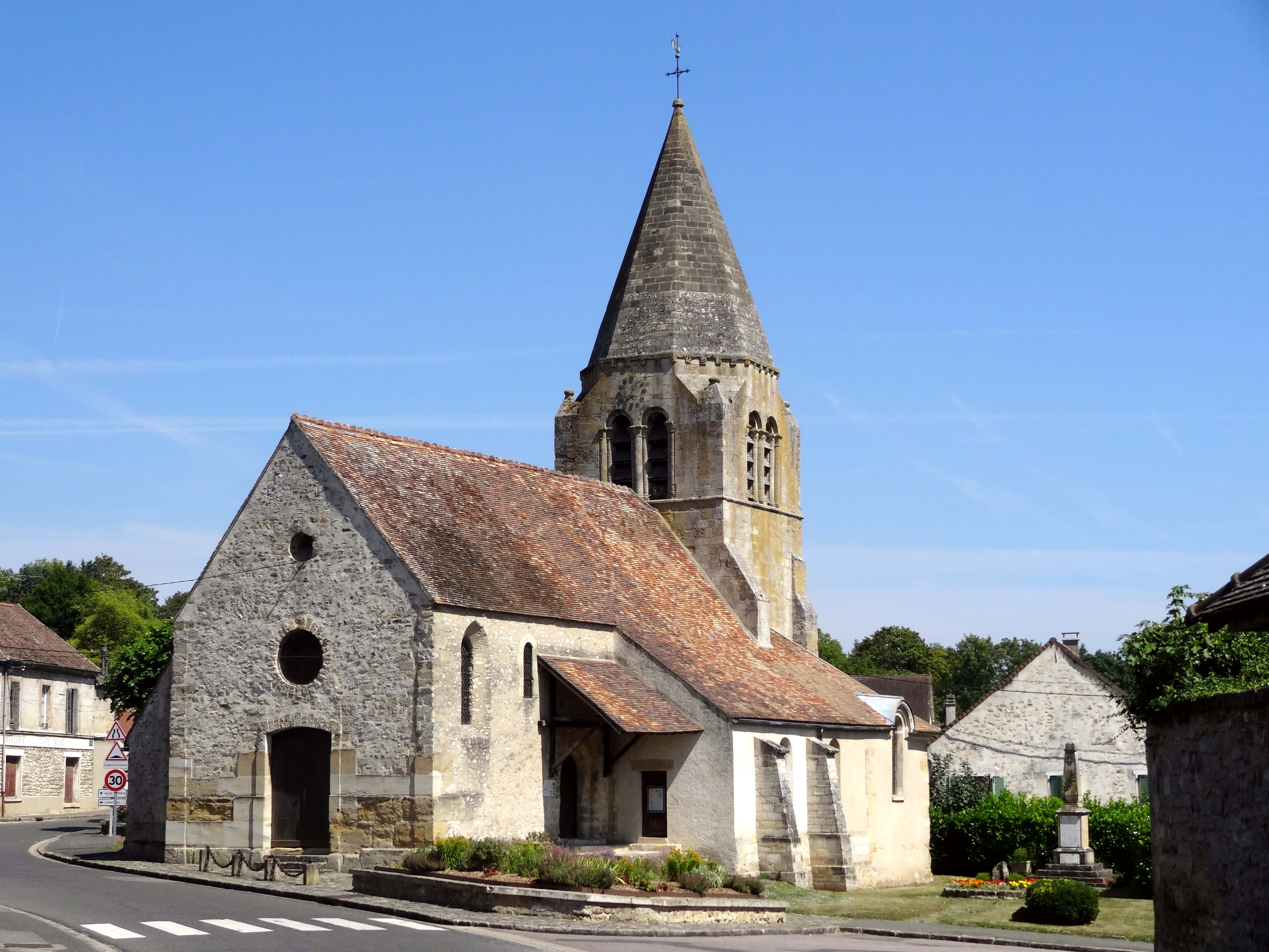 Église Saint-Nicolas de Tessancourt-sur-Aubette - voir titre.